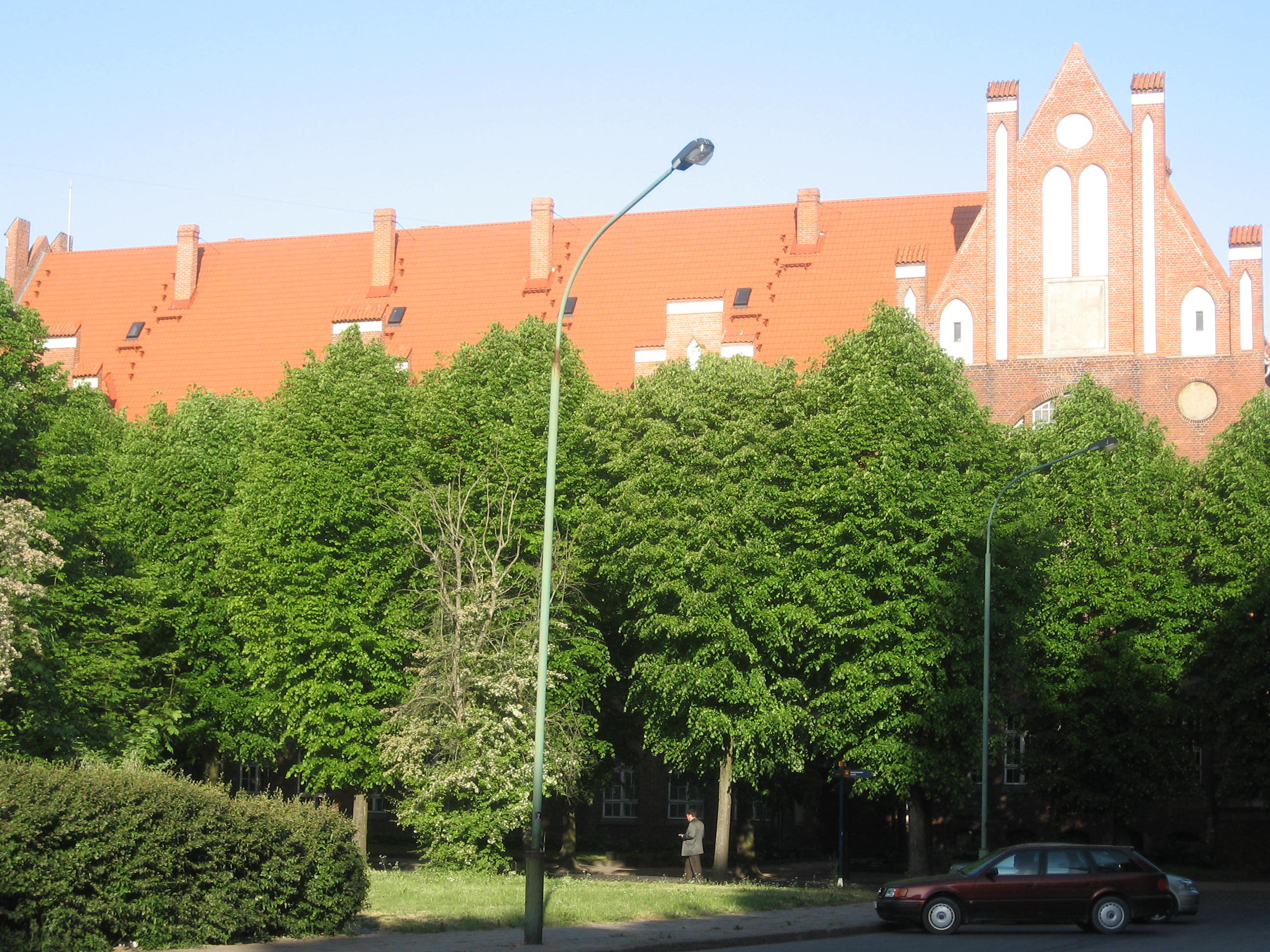 Pedagogikos fakultetas